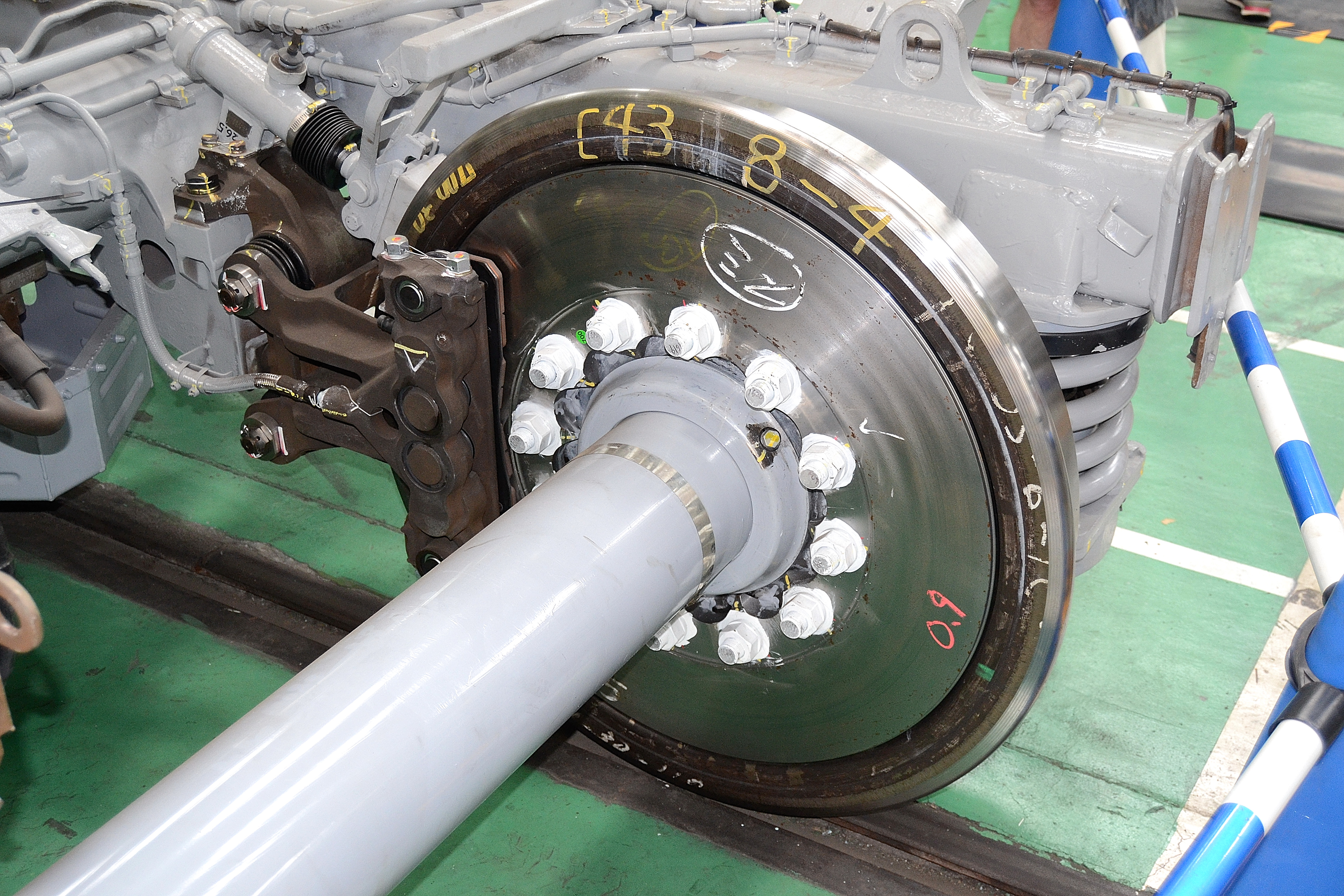 700系のキャリパー式車輪ディスクブレーキ、2枚のディスクローターが車輪を挟み込む形で取付けられているが、それを車輪に固定する締結ボルトとナットがディスクローターの内周で締結されており、内周締結式と呼ばれている（2014年、浜松工場で開催された新幹線なるほど発見デーにおいて撮影）。